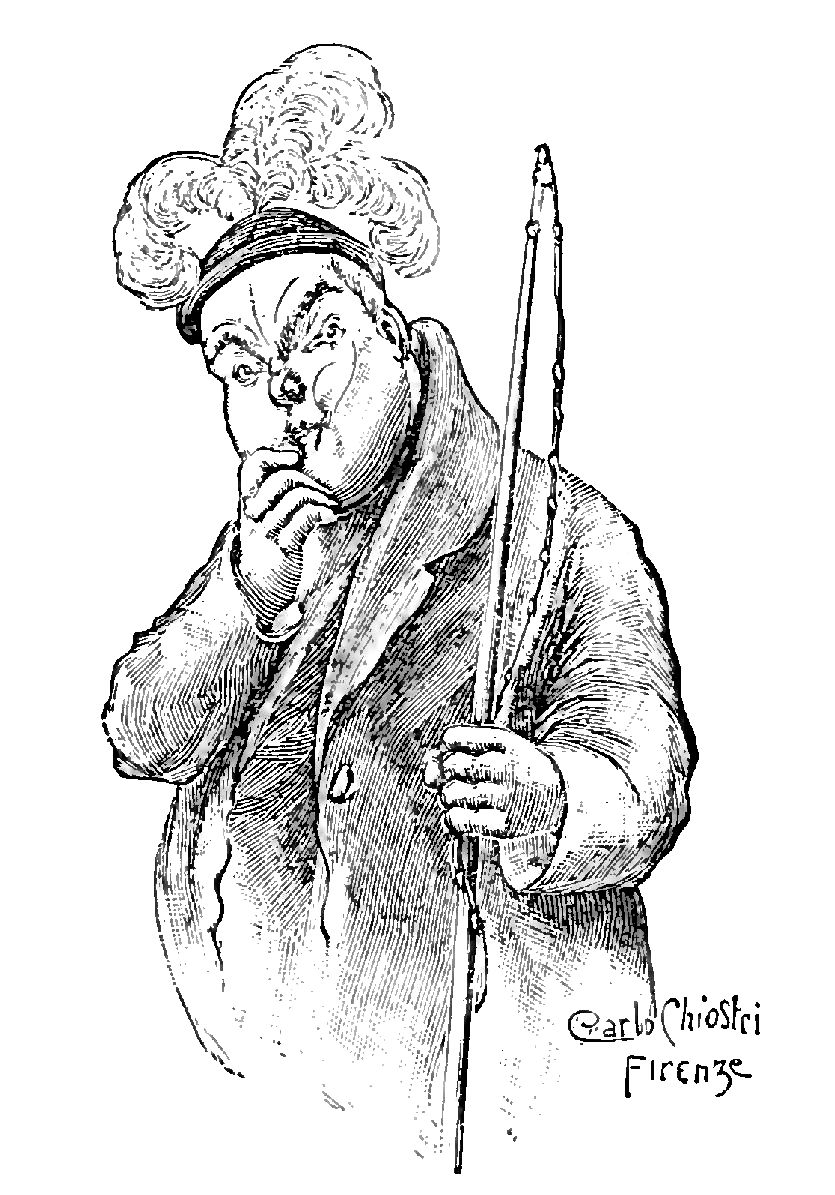 Illustrations from "Le avventure di Pinocchio, storia di un burattino", Carlo Collodi, Bemporad & figlio, Firenze 1902 (Drawings and engravings by Carlo Chiostri, and A. Bongini)